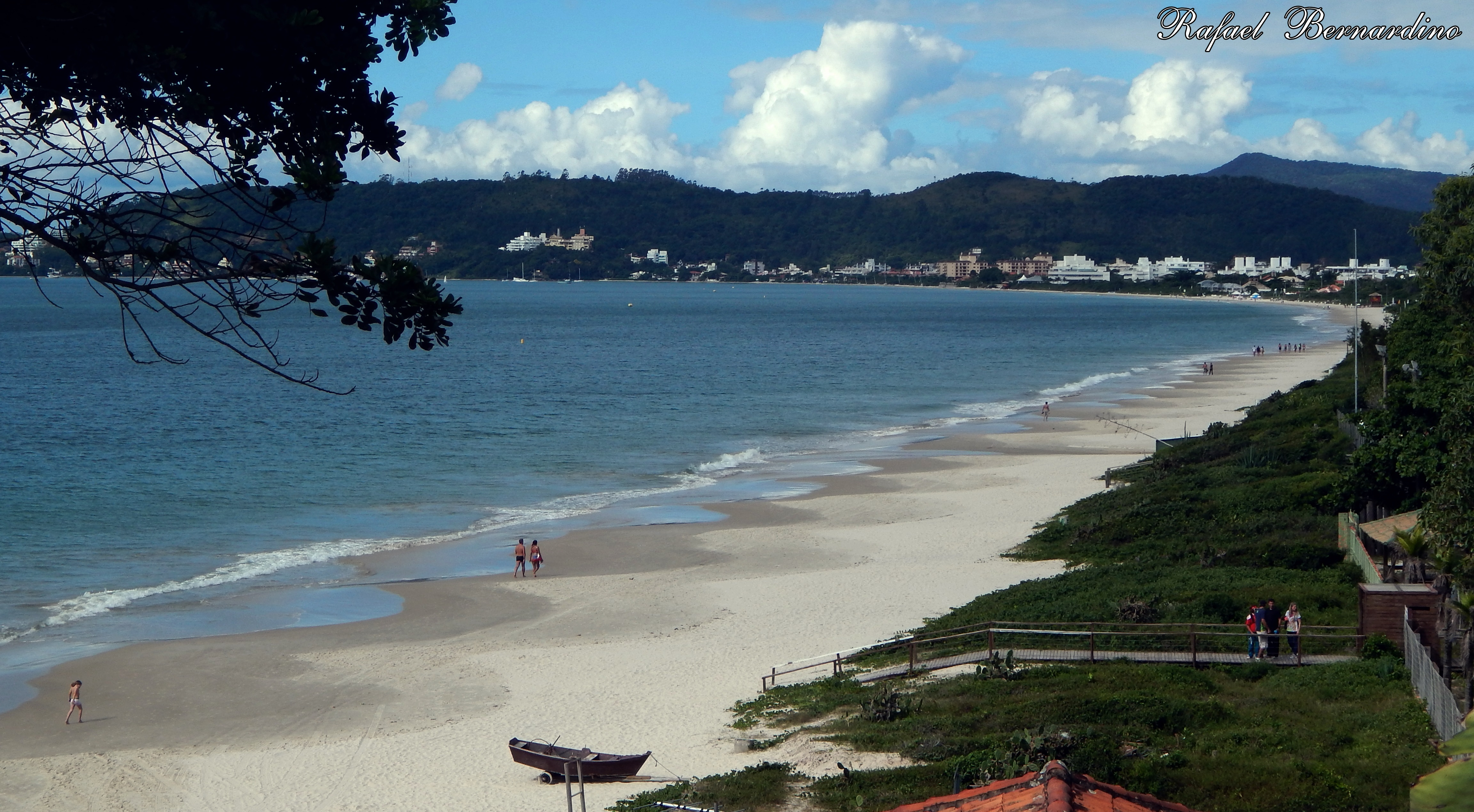 A praia de Jurerê se encontra no lado norte da ilha em Florianópolis/SC. É uma das praias mais visitadas por turistas na temporada de verão.